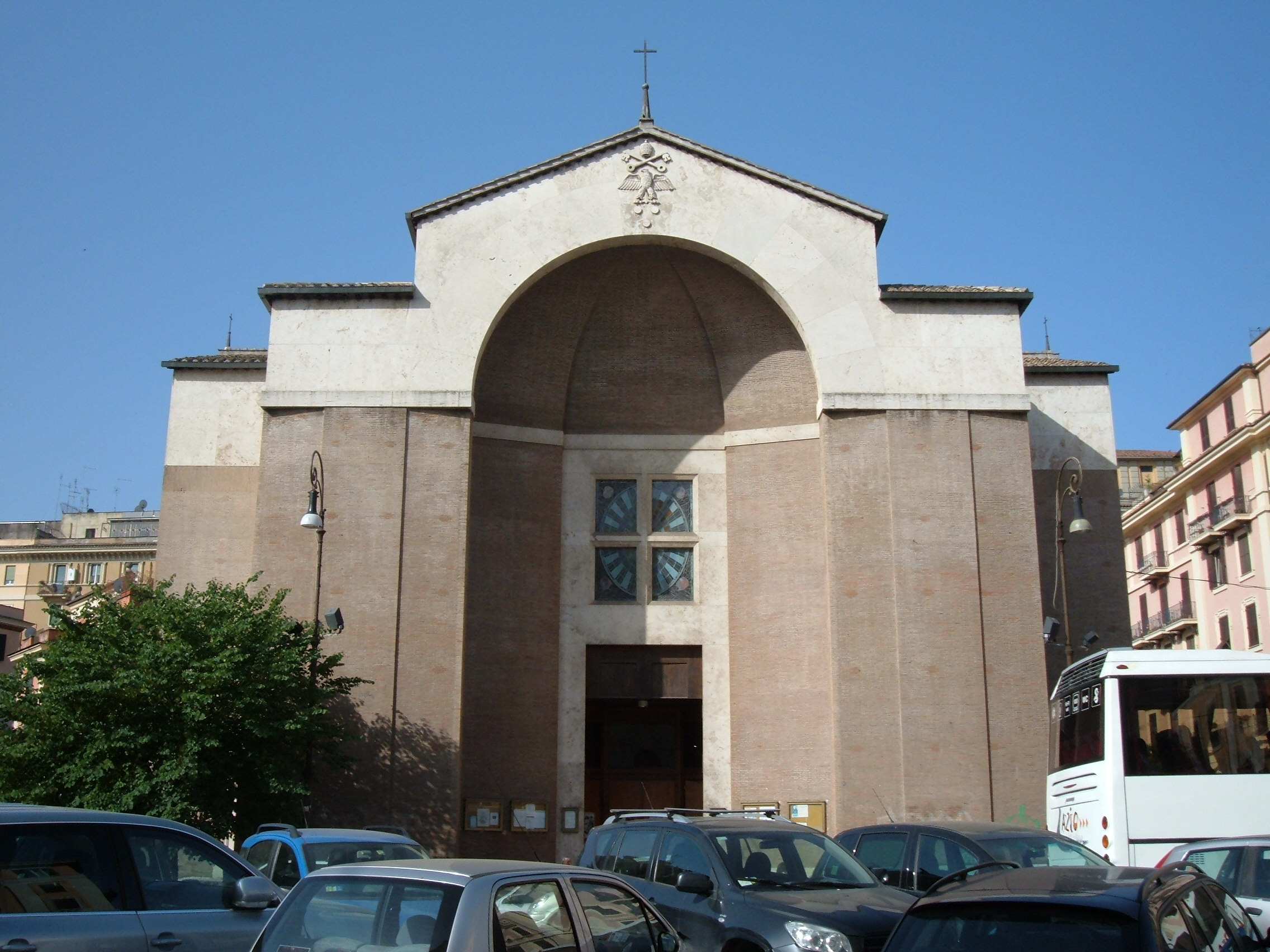 Chiesa di San Saturnino, a Roma, nel quartiere Trieste.